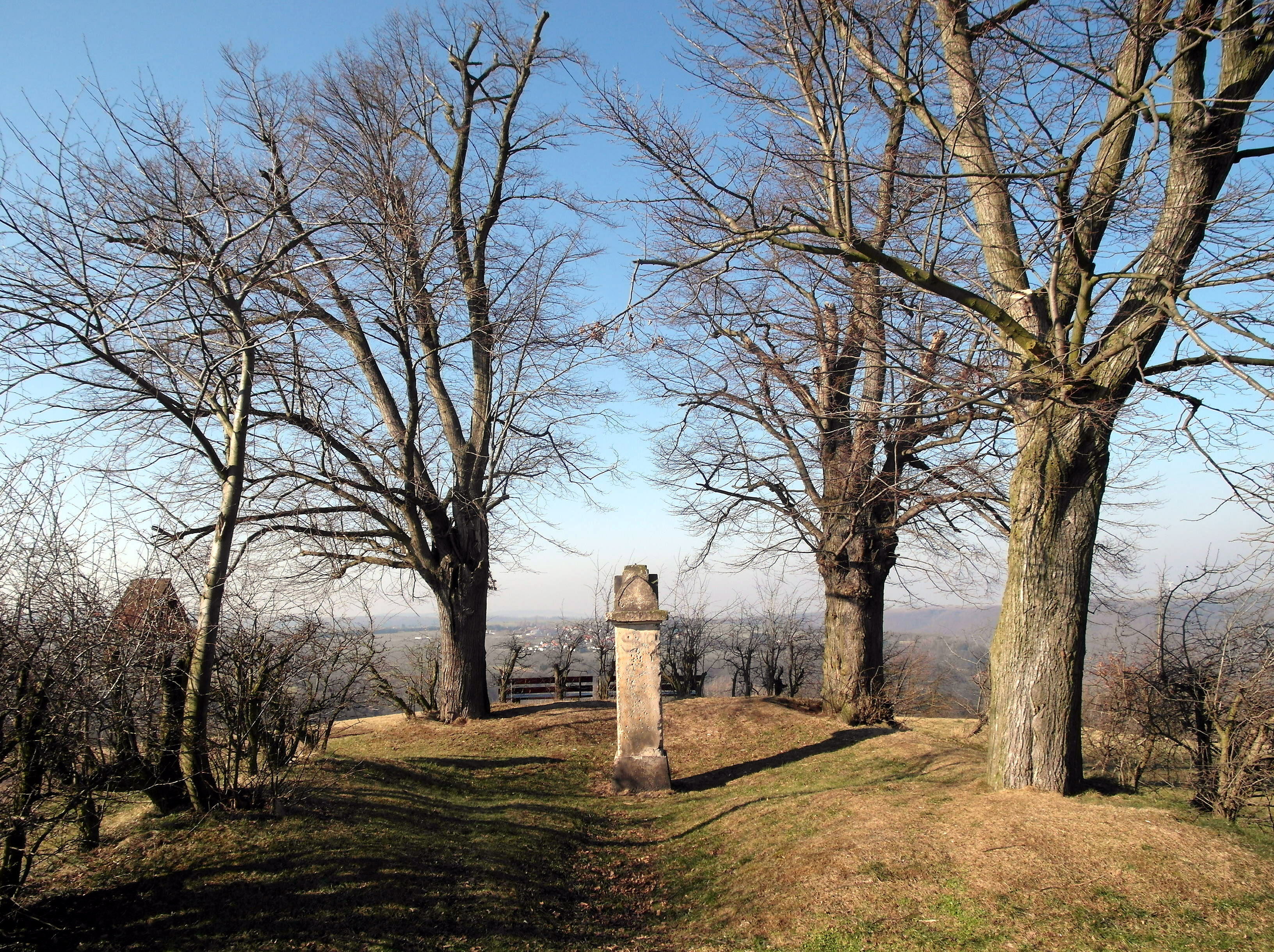 16.02.2015 01734 Rabenau: Konfessionsdenkmal. 1830 zur Erinnerung an die 300-Jahr-Feier der Überreichung der Augsburger Konfession an Kaiser Karl V. auf dem Galgenberg errichtet und 1873 auf den heutigen Standort versetzt. [SAM8188.JPG]20150216035DR.JPG(c)Blobelt